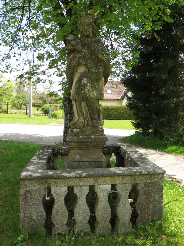 Socha svatého Jana Nepomuckého, Desky (Malonty).